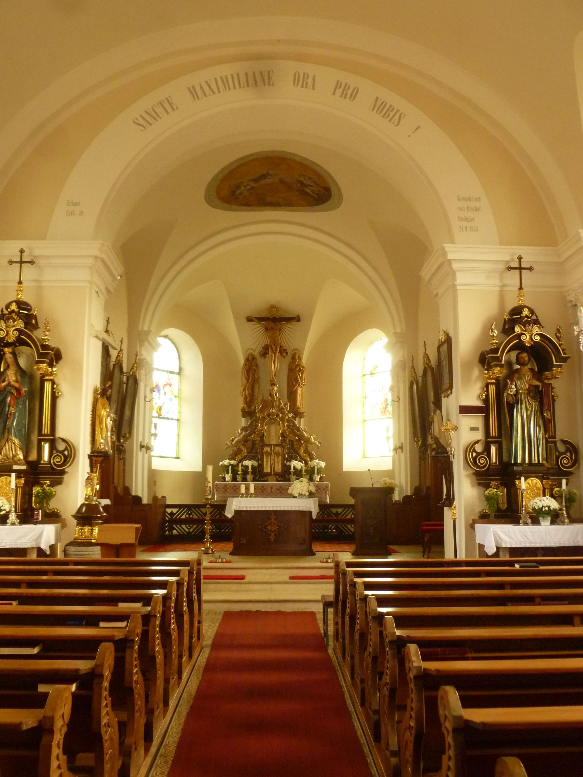 Kath. Pfarrkirche hl. Maximilian